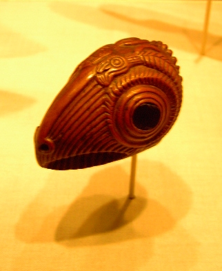 Geschnitztes Eidechsenköpfchen (L. ca. 12 cm) der Osterinselkultur; Material: Toromiro-Holz, Obsidian. Metropolitan Museum of Art, New York City